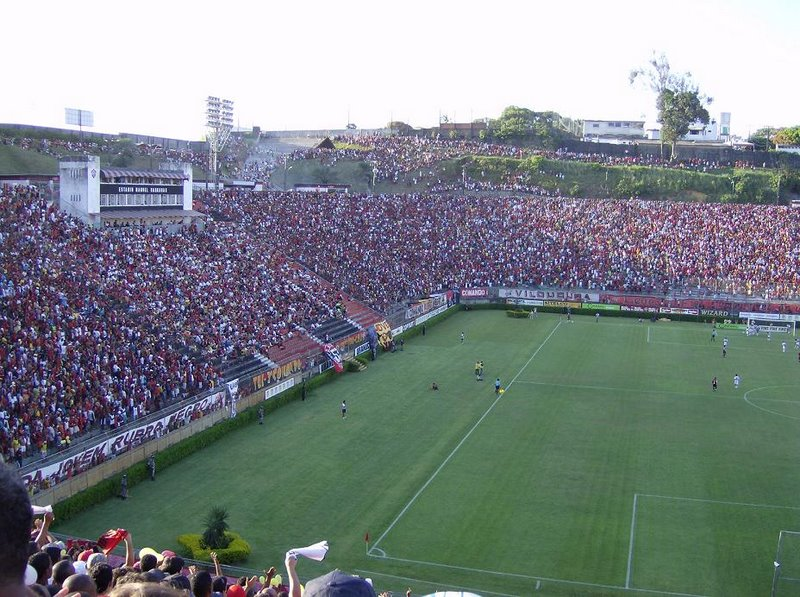 Jogo do Vitória no Barradão